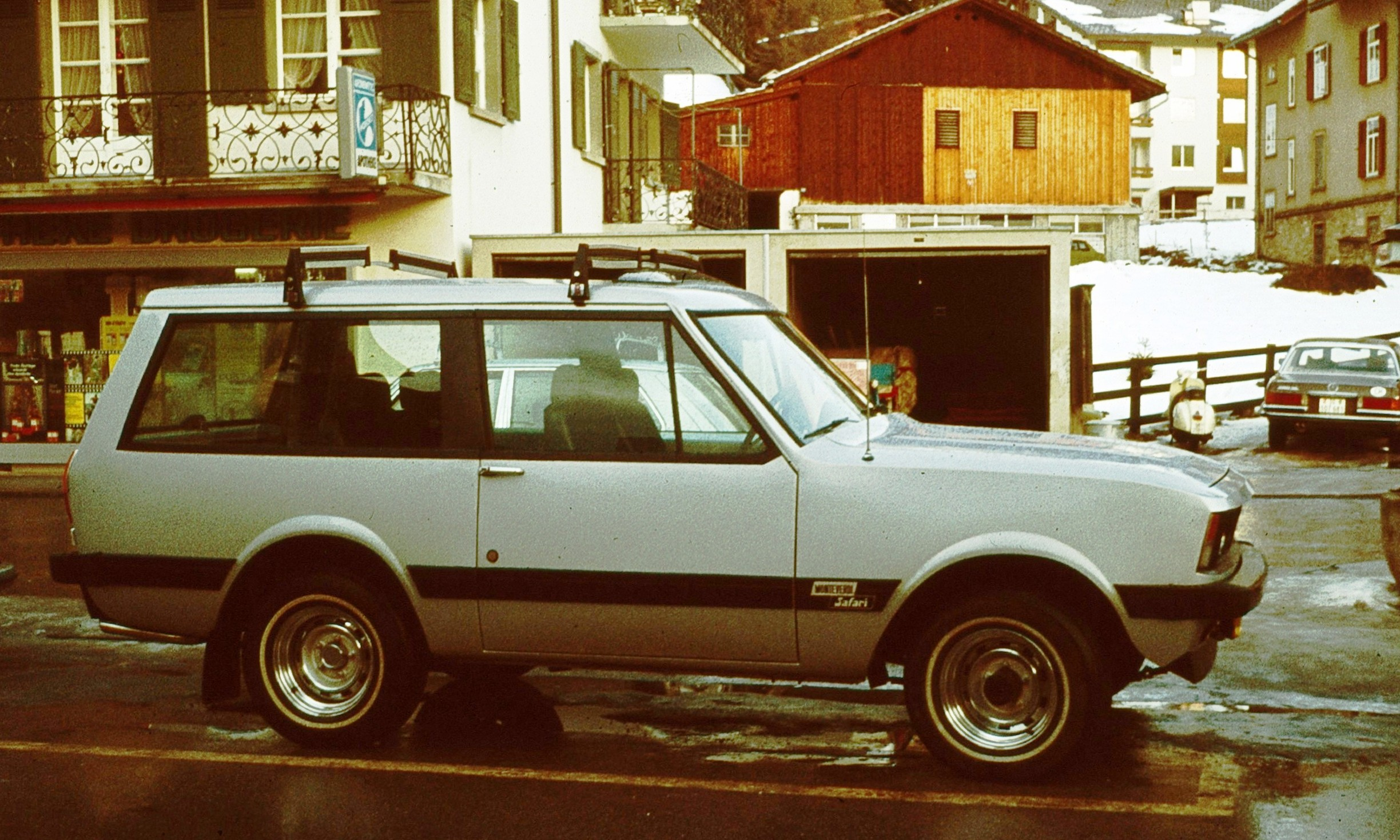 Monteverdo Safari in a ski resort late spring 1978